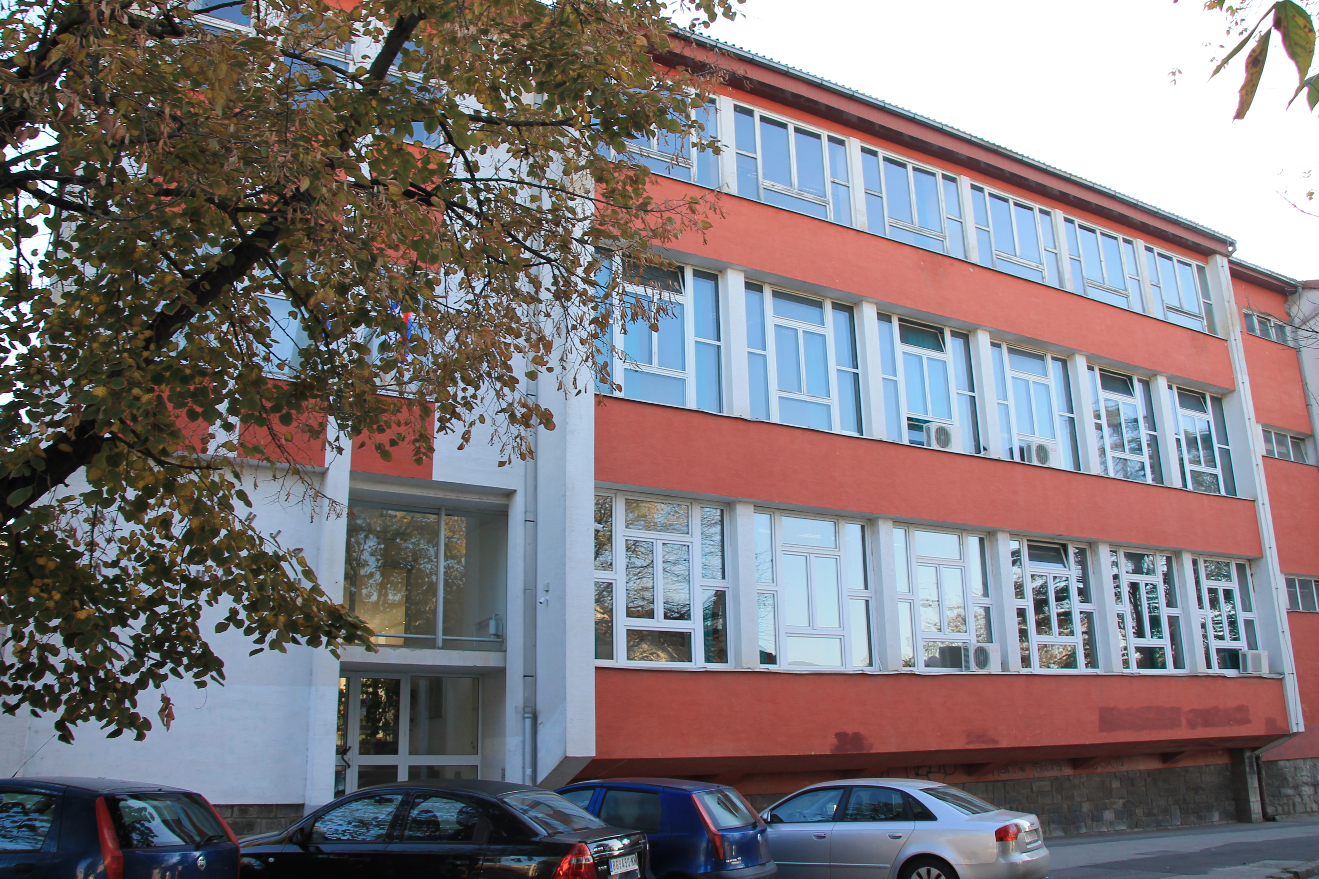 Zgrada gimnazije Mladenovac